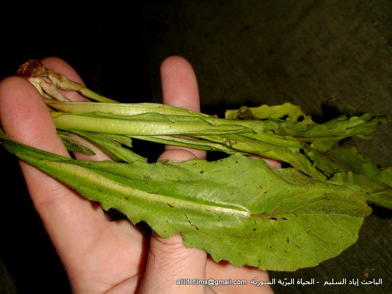 نباتات برية سورية تؤكل